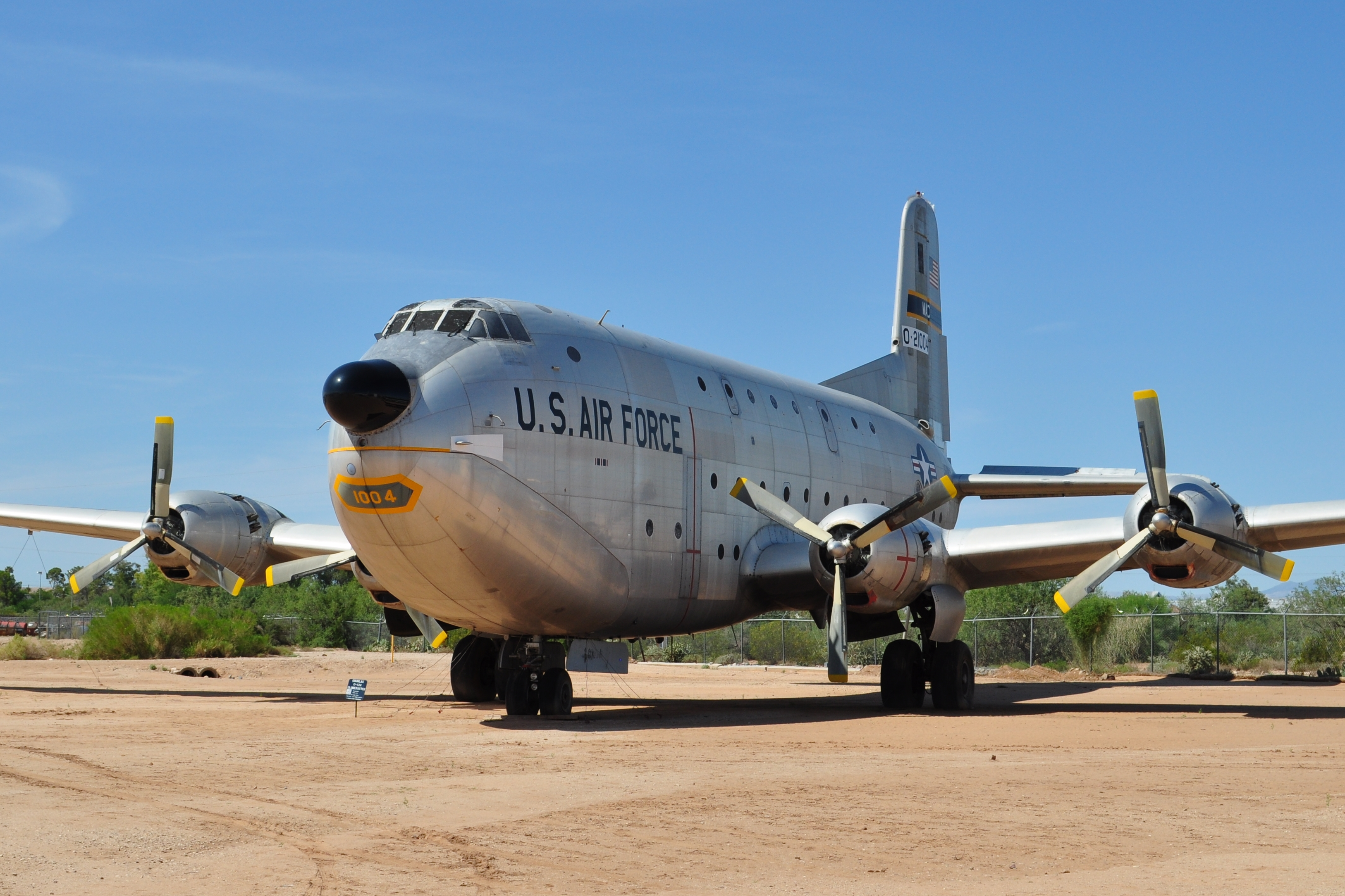 USAF PIMA